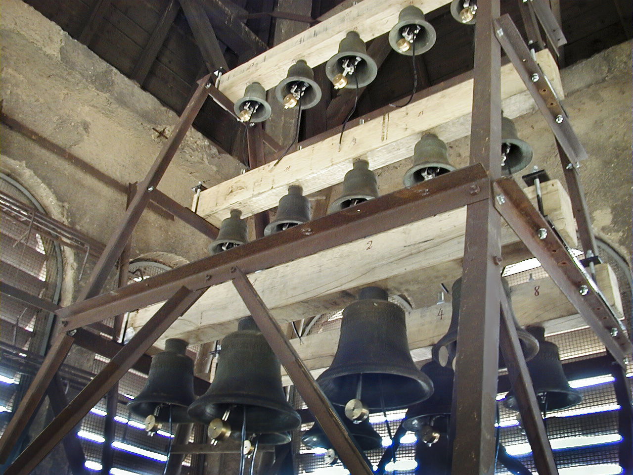 Sujet:Klackespill am Kierchtuerm vun der Waasserbëlleger Kierch Auteur: Eege Foto vum Aloyse Ludwig, dee se dem Benotzer:Cornischong zoukomme gelooss huet